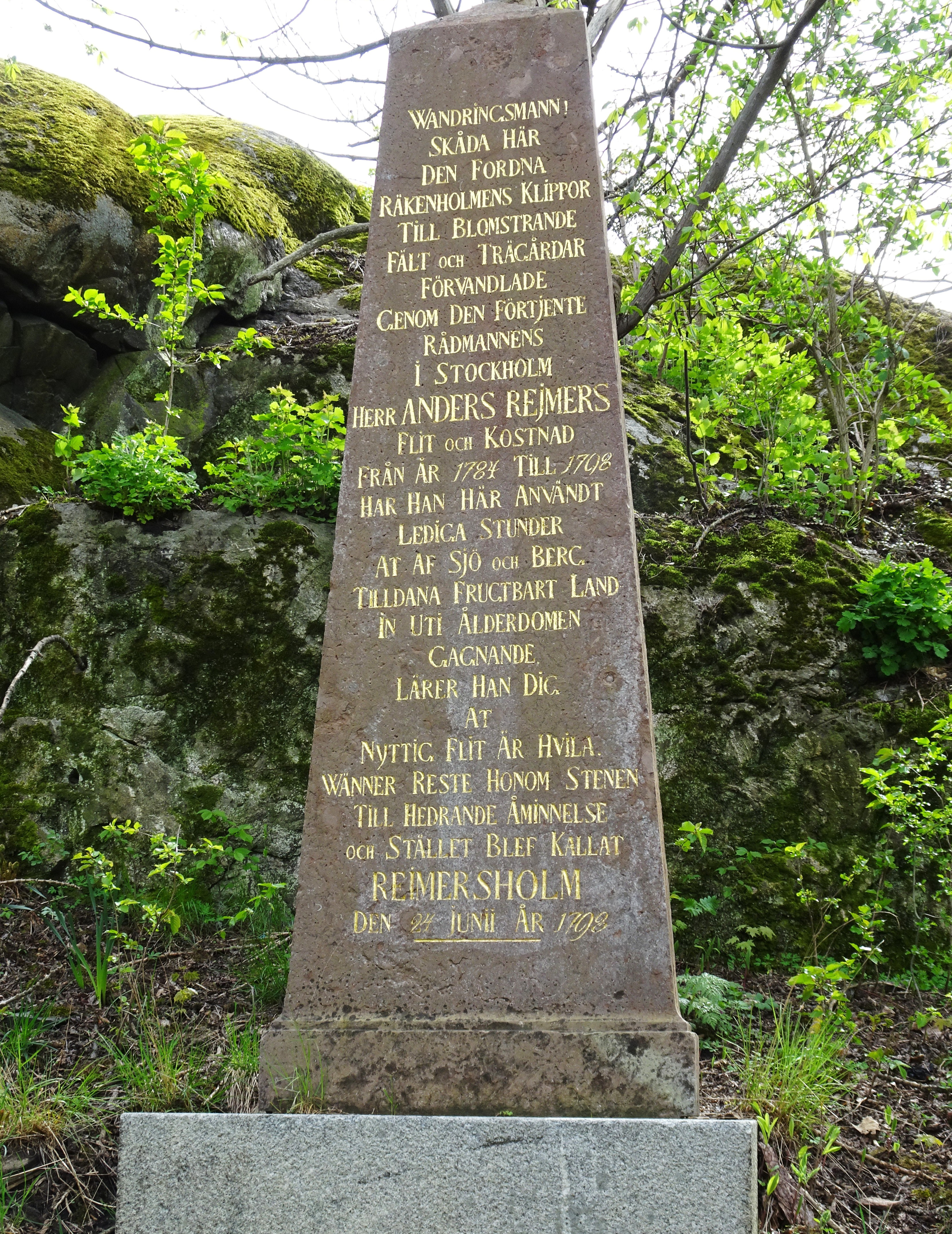 Reimersholme, minnessten